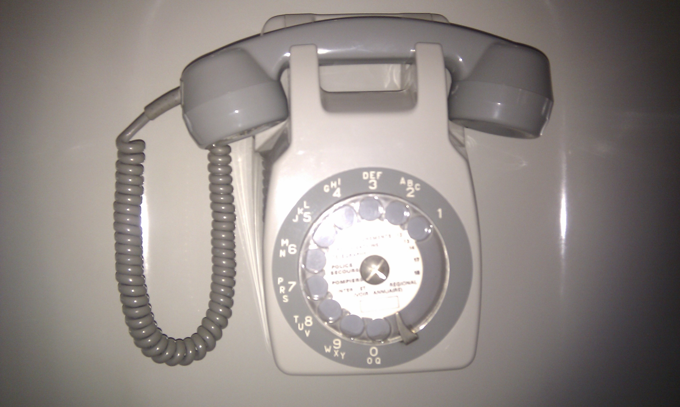 Ancien téléphone à cadran - Cabine publique IUFM de Bonneville - Encore en service en juin 2011